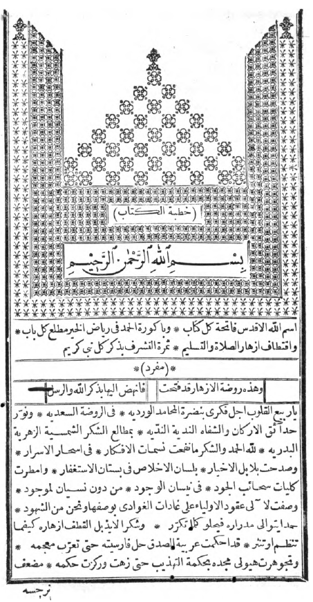 الصفحة الأولى من كتاب - وهي ترجمة لديوان سعدي الشيرازي الى العربية - تعريب جبرائيل بن يوسف المخلّع (ت. ١٢٦٨ هـ / ١٨٥١ م). مطبوع في بولاق سنة ١٢٦٣ هـ / ١٨٤٧ م